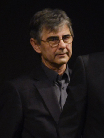 Boris Farkaš